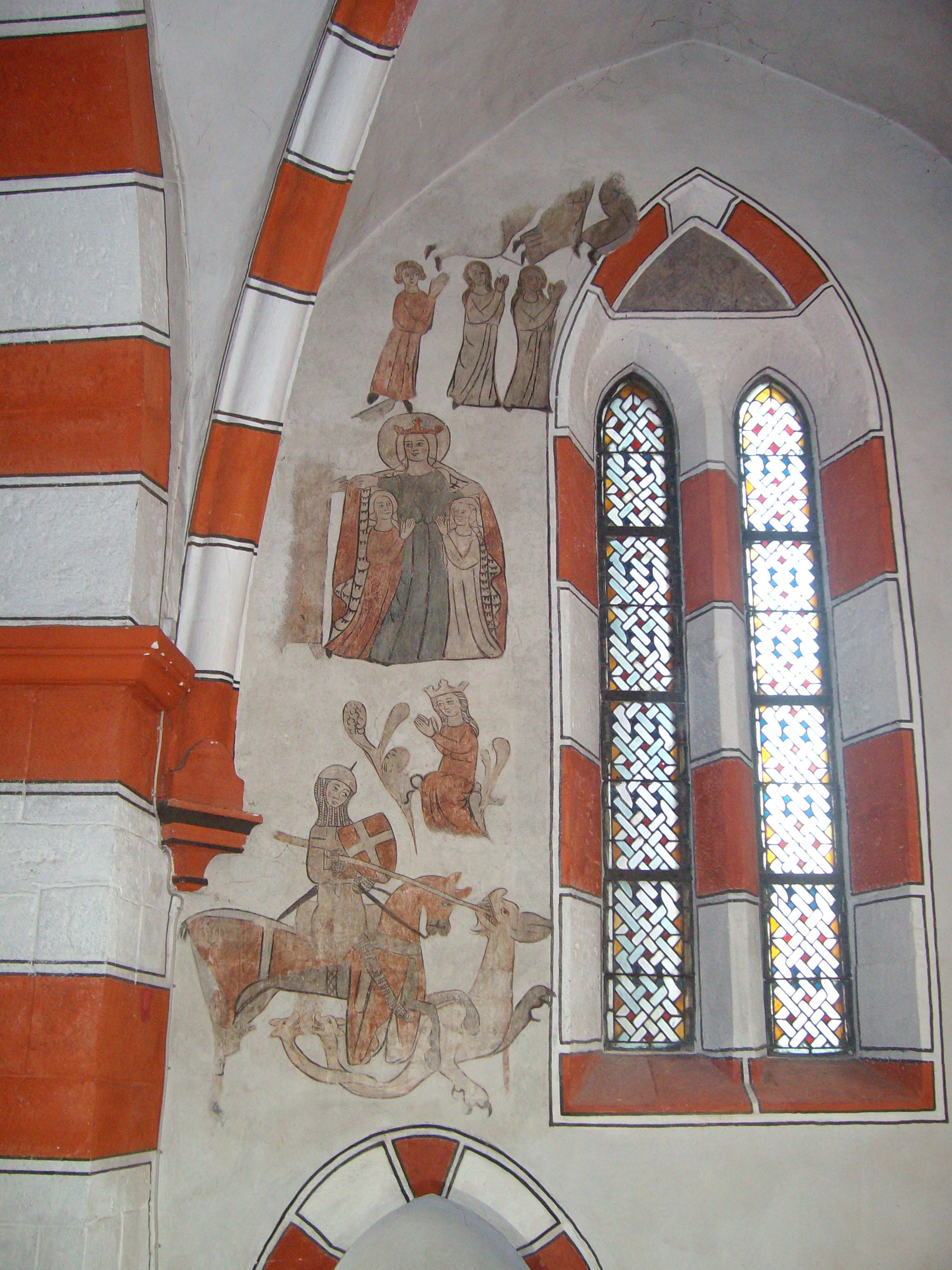 Wandmalereien im Chor der Evang. Stadtkirche in Laubach, Hessen